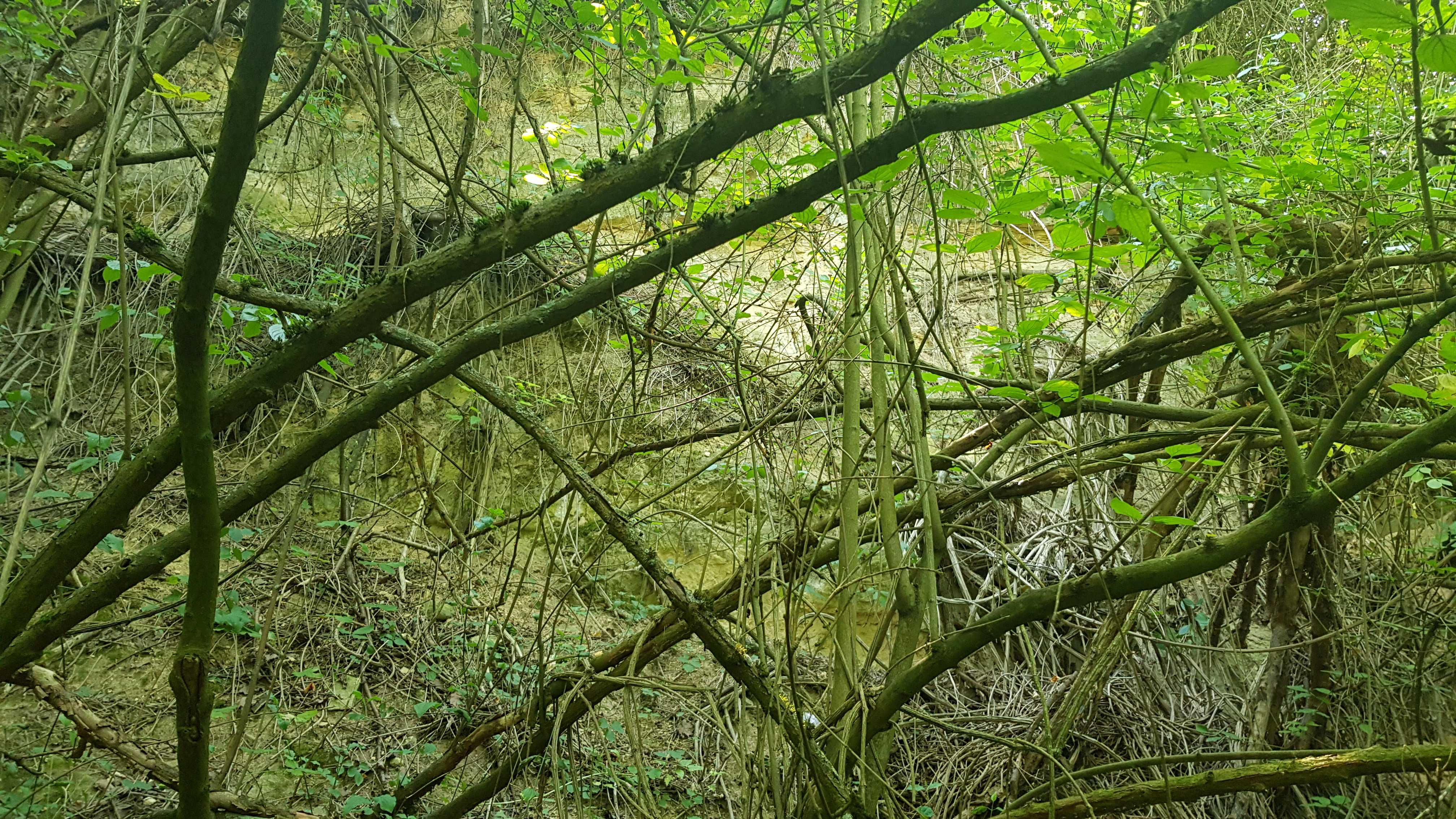 Groeve Moonen, Voerendaal, Nederland